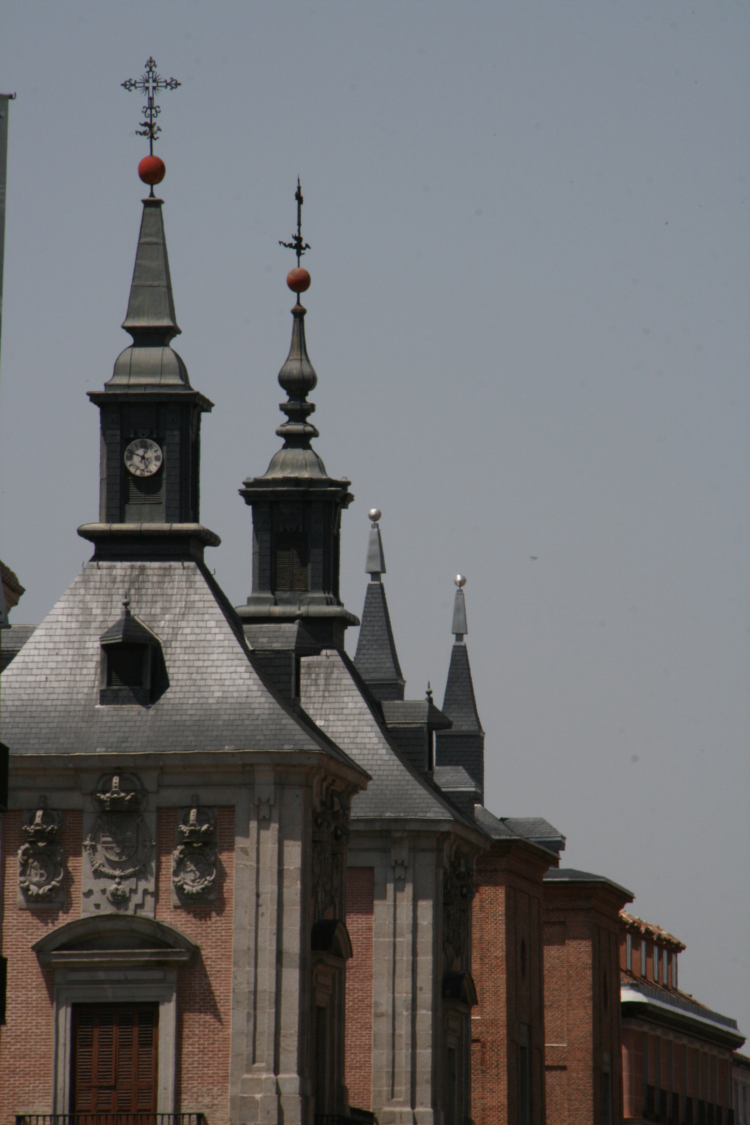 Calle Mayor - Pináculos